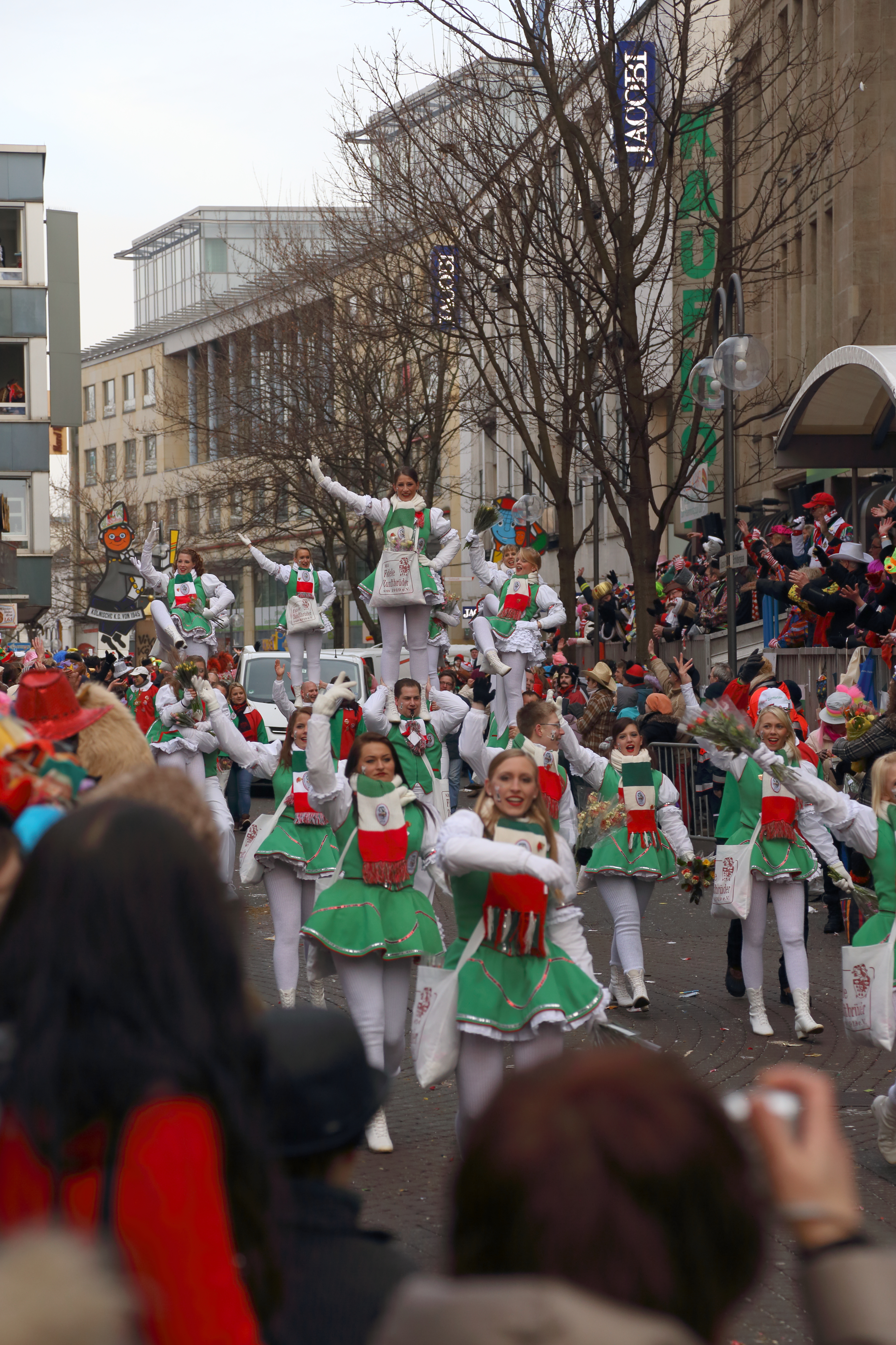 Kölner Rosenmontagszug 2013